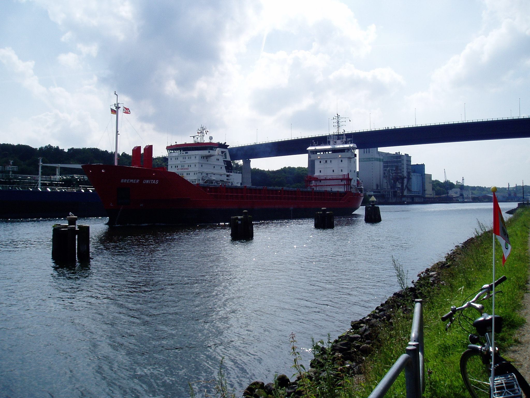 "Bremer Unitas" bei Kiel, Nord-Ostsee-Kanal, Holtenauer Hochbrücke